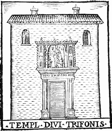 Chiesa scomparsa di San Trifone, a Roma, nel rione Campo Marzio.